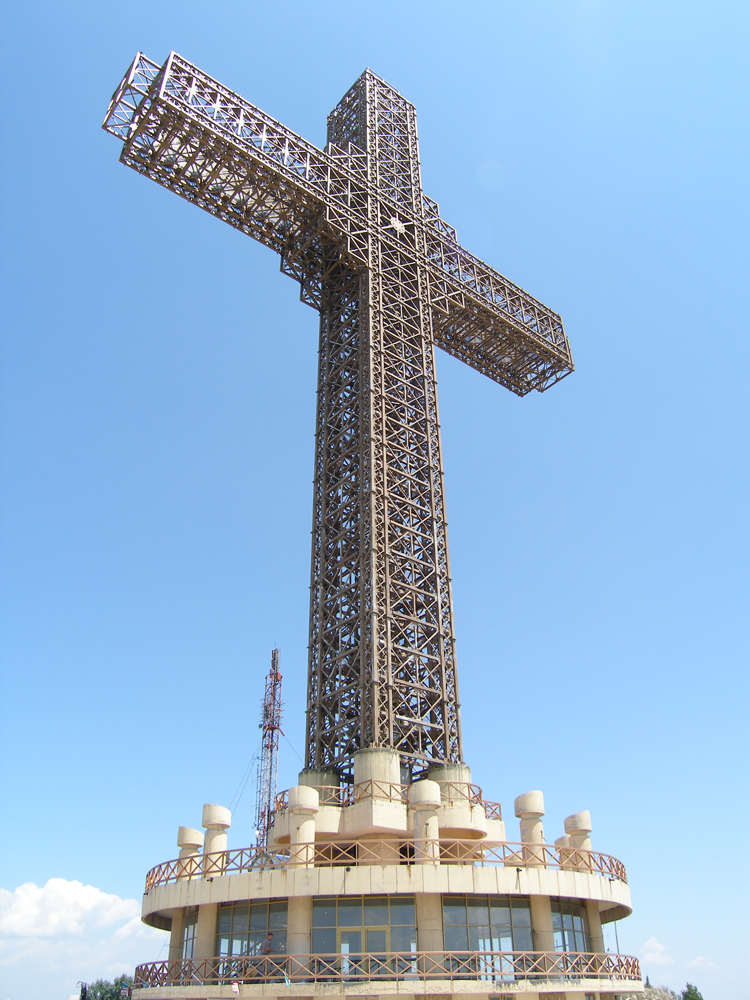 Krzyż ustawiony na szczycie góry Wodno